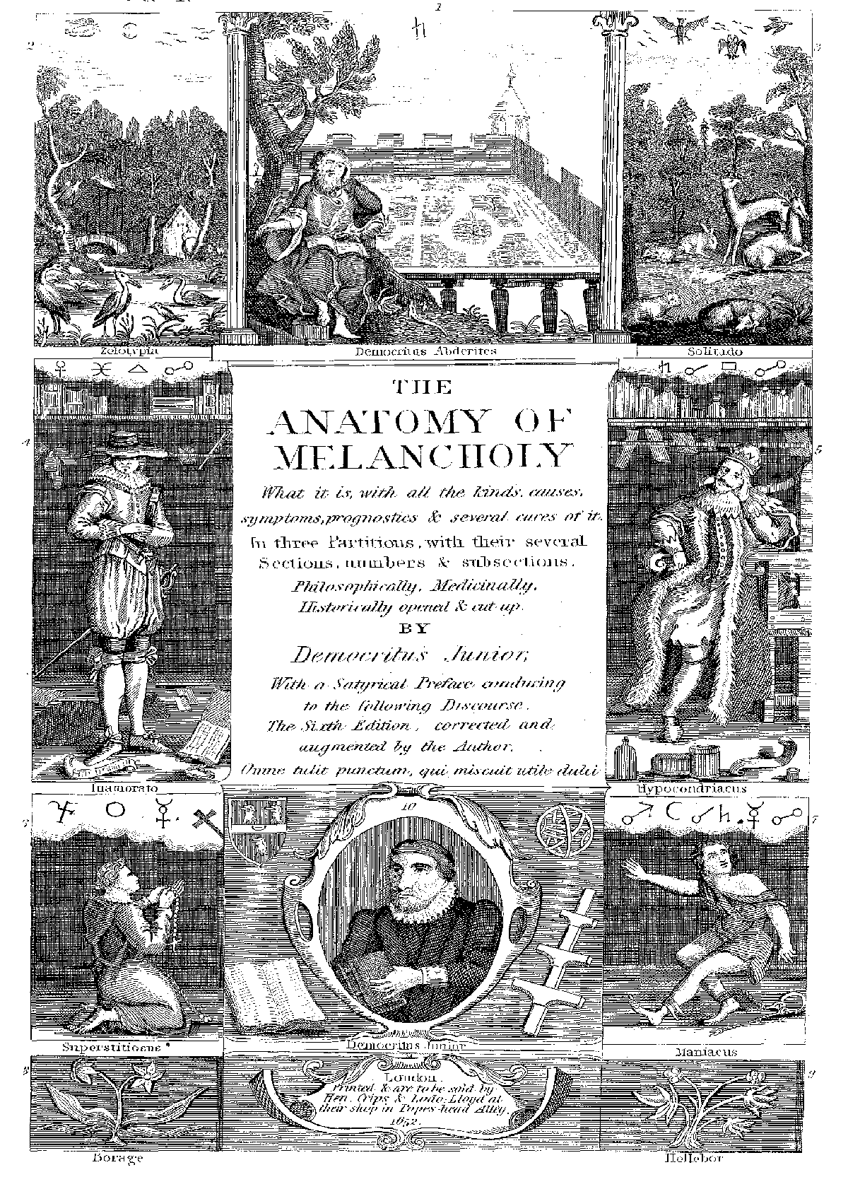 Frontispiz der ersten Ausgabe der Abhandlung "Anatomie der Melancholie" von Robert Burton (1621) Andere Versionen: Keine Lizenzstatur für das einzelne Bild: gemeinfrei, da Urheber über 70 Jahre tot